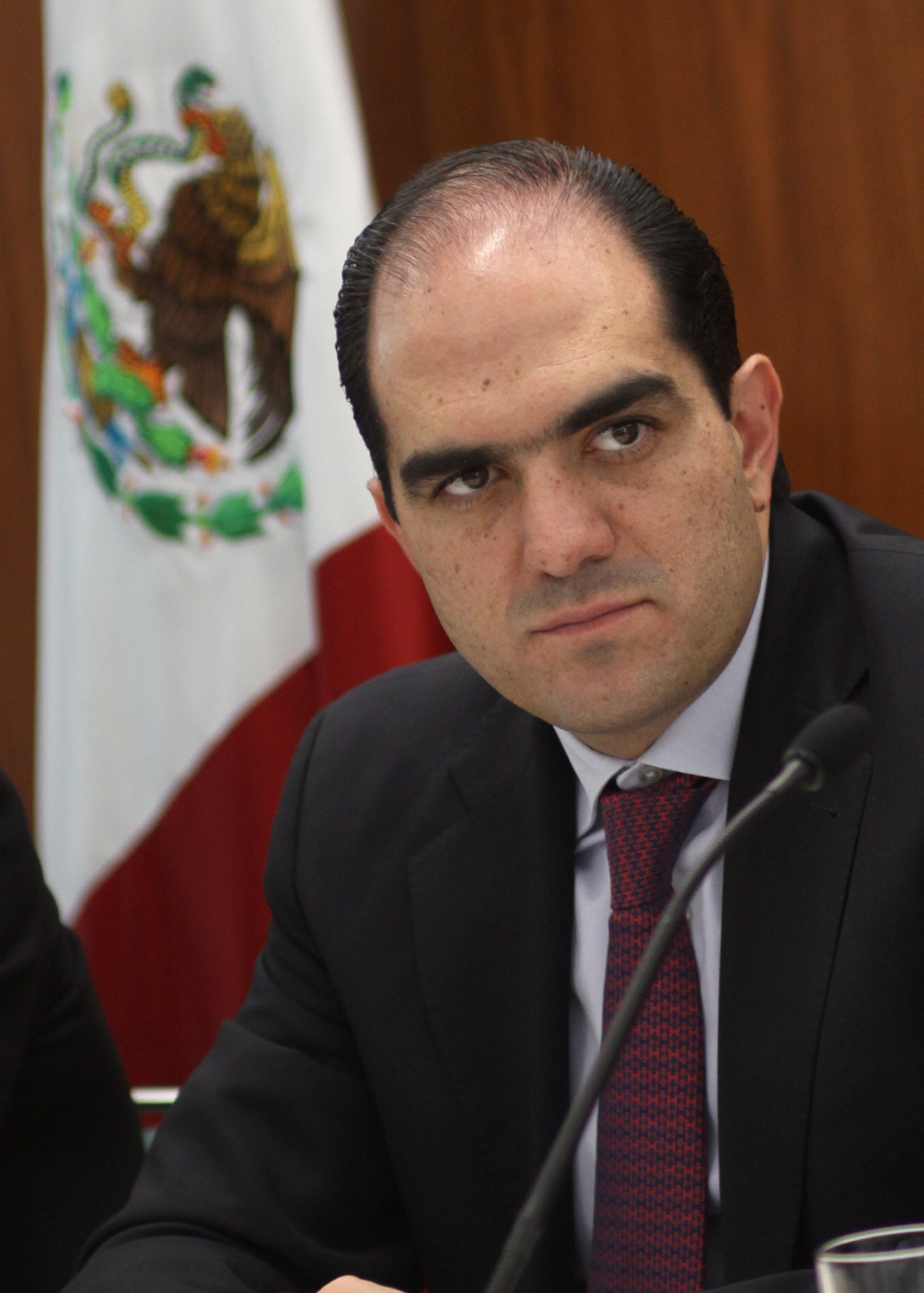 Daniel Karam Toumeh actual director general del Instituto Mexicano del Seguro Social.